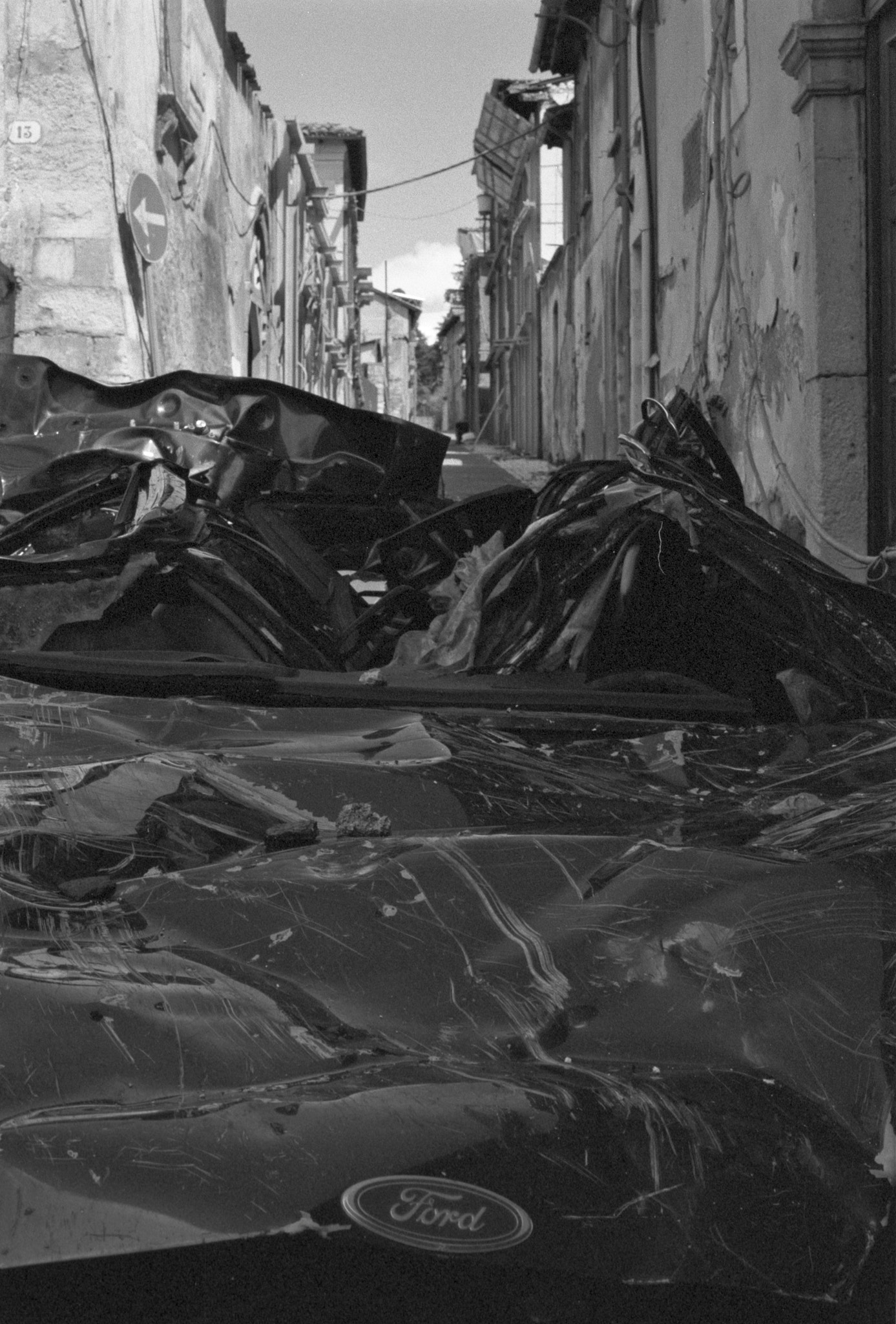 500px provided description: L'Aquila post eartquake 2012 - via San Pietro - details Post Terremoto L'Aquila 2012 Piazza San Pietro - dettagli [#film ,#ford ,#earthquake ,#abruzzo ,#l'aquila ,#terremoto]